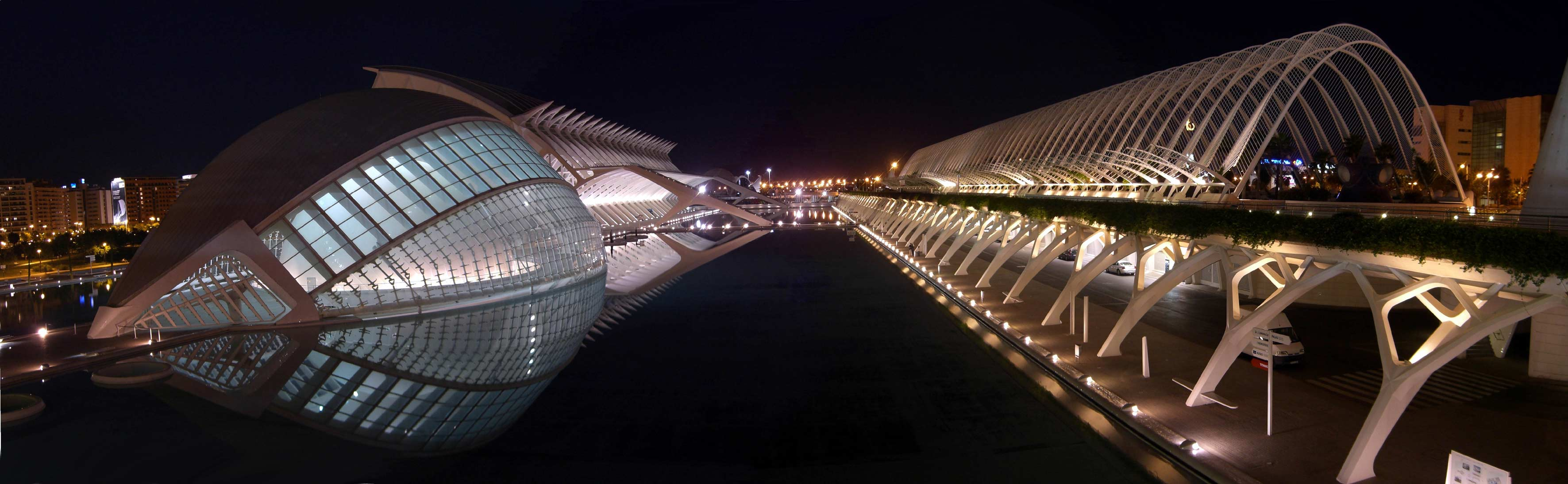 Panoramica nocturna de la Ciudad de las Artes y de las Ciencias, en Valencia (España)